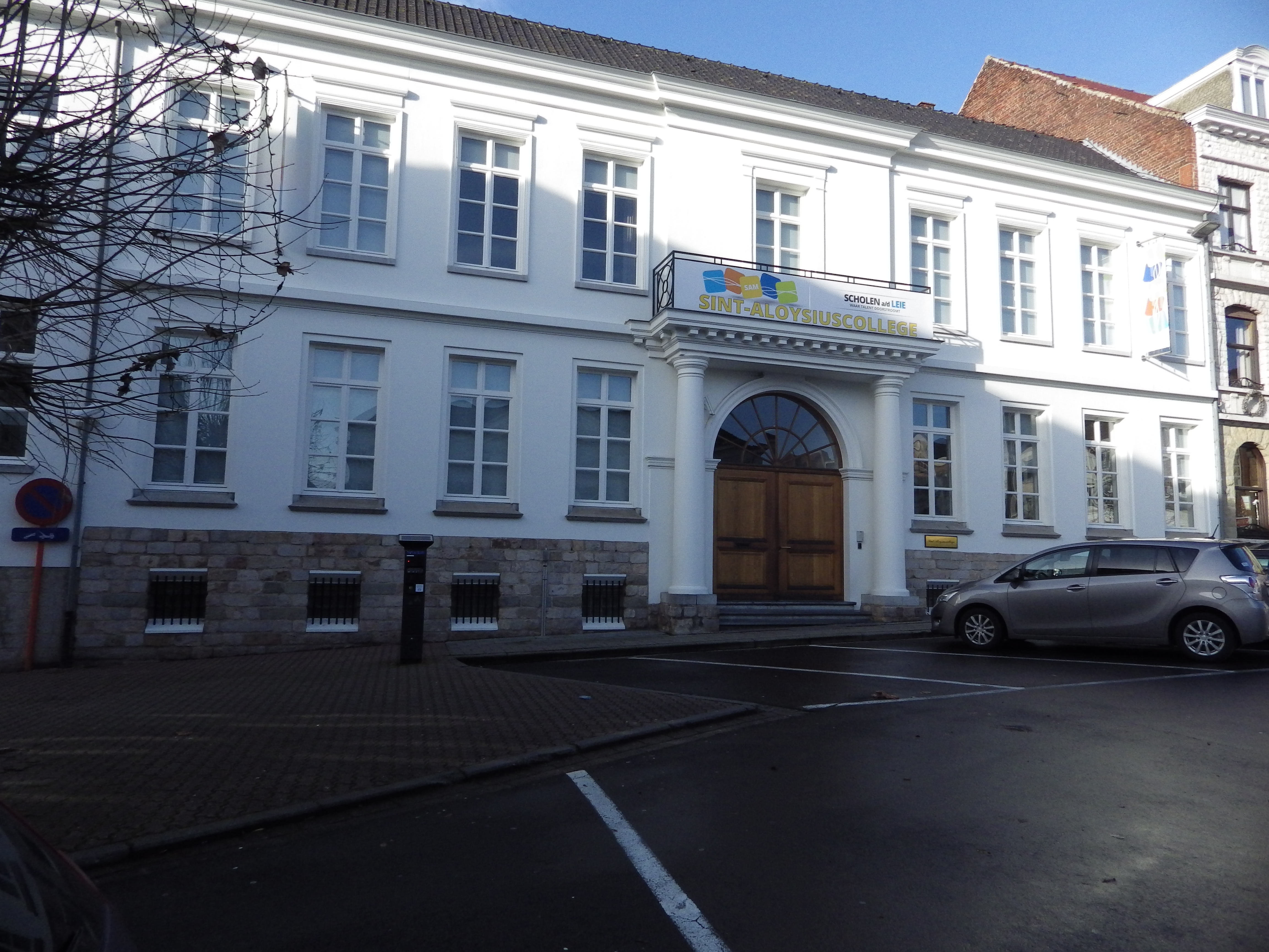 Foto van de ingang van het Sint-Aloysiuscollege Menen. Ingangspoort naar de theaterzaal.